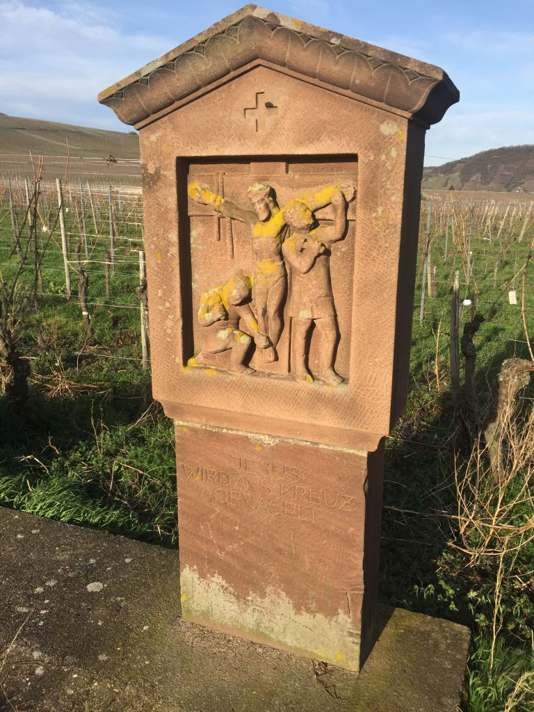 Kreuzweg Trittenheim - Station 11 von 14